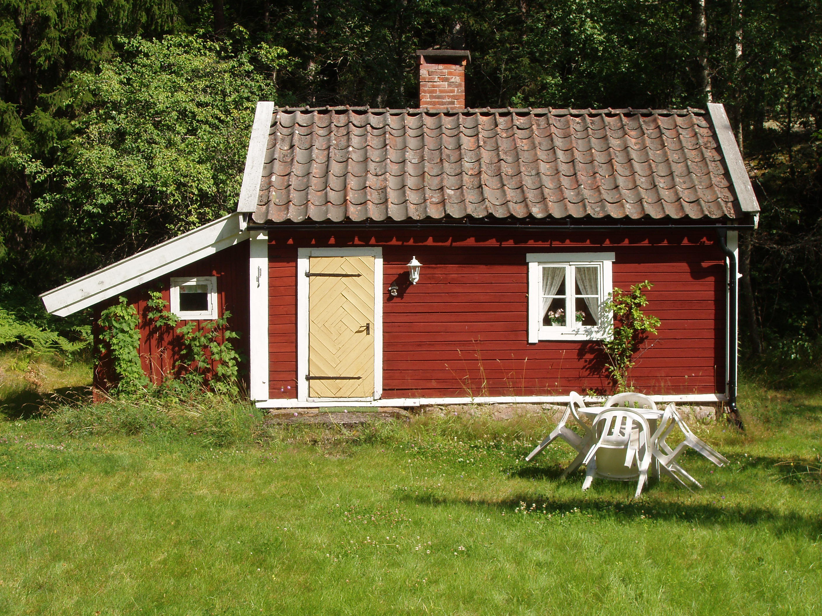 Mindre torparstuga på 1 rum och kök från slutet av 1700-talet på fastigheten Lillnäset 1:3, Ljusterö, Österåkers kommun. Tillbyggd på 1900-talet med separat barnkammare för användning som fritidshus, gäststuga. Torpet är renoverat under tidigt 1900-tal, dock ej av kulturhistoriskt sakkunnig och saknar därför möjligheten att kunna kulturminnesmärkas. Torpet är synat av Ljusterö hembygsförening.